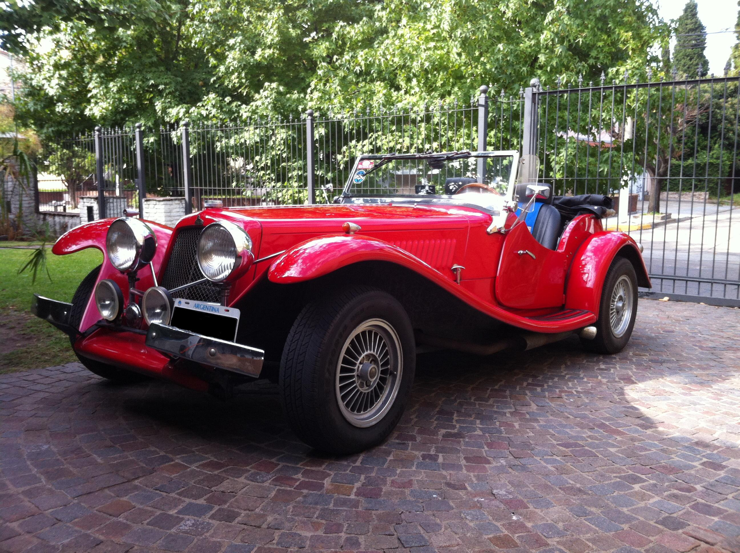 Antique Serial No.068